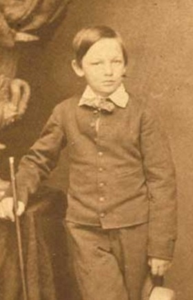 エイブラハム・リンカーンの三男、ウィリー・リンカーン。1862年撮影